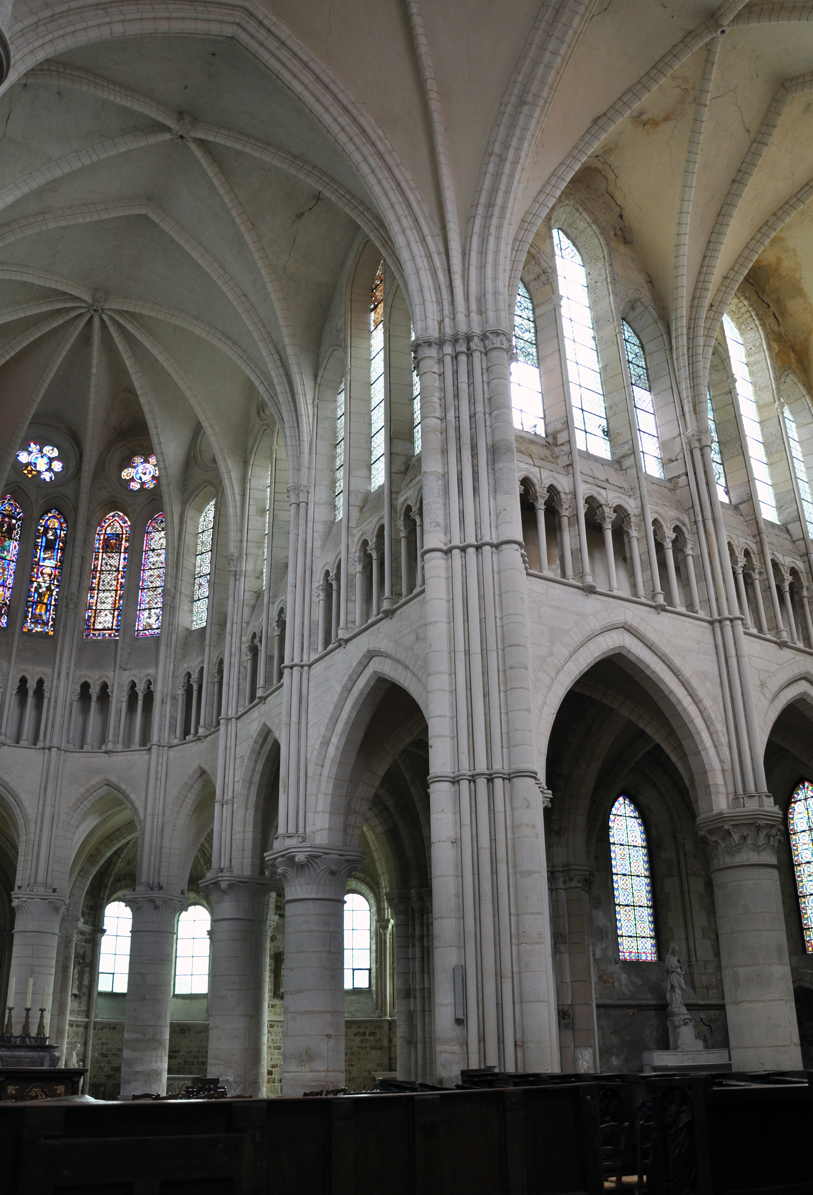 L'église Saint-Pierre-et-Saint-Paul à Orbais l'Abbaye.